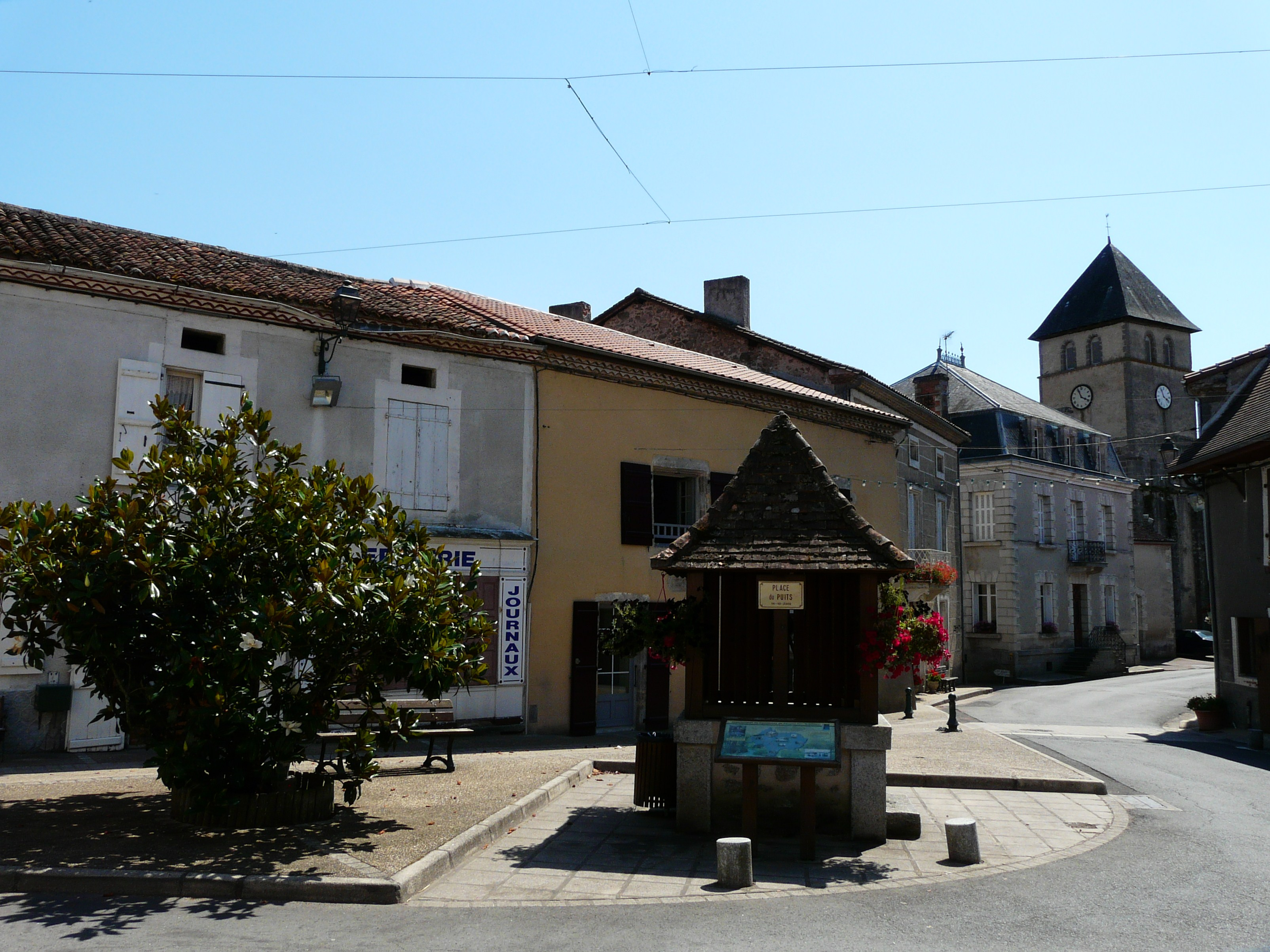 La place du Puits dans le bourg de Busserolles, Dordogne, France.